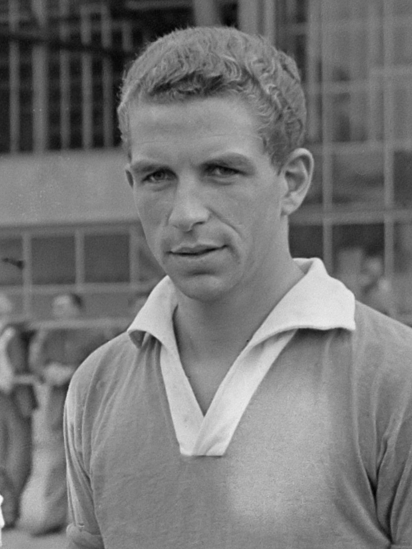 Voetbaltraining Feyenoord begonnen. Guus Haak 2 augustus 1963